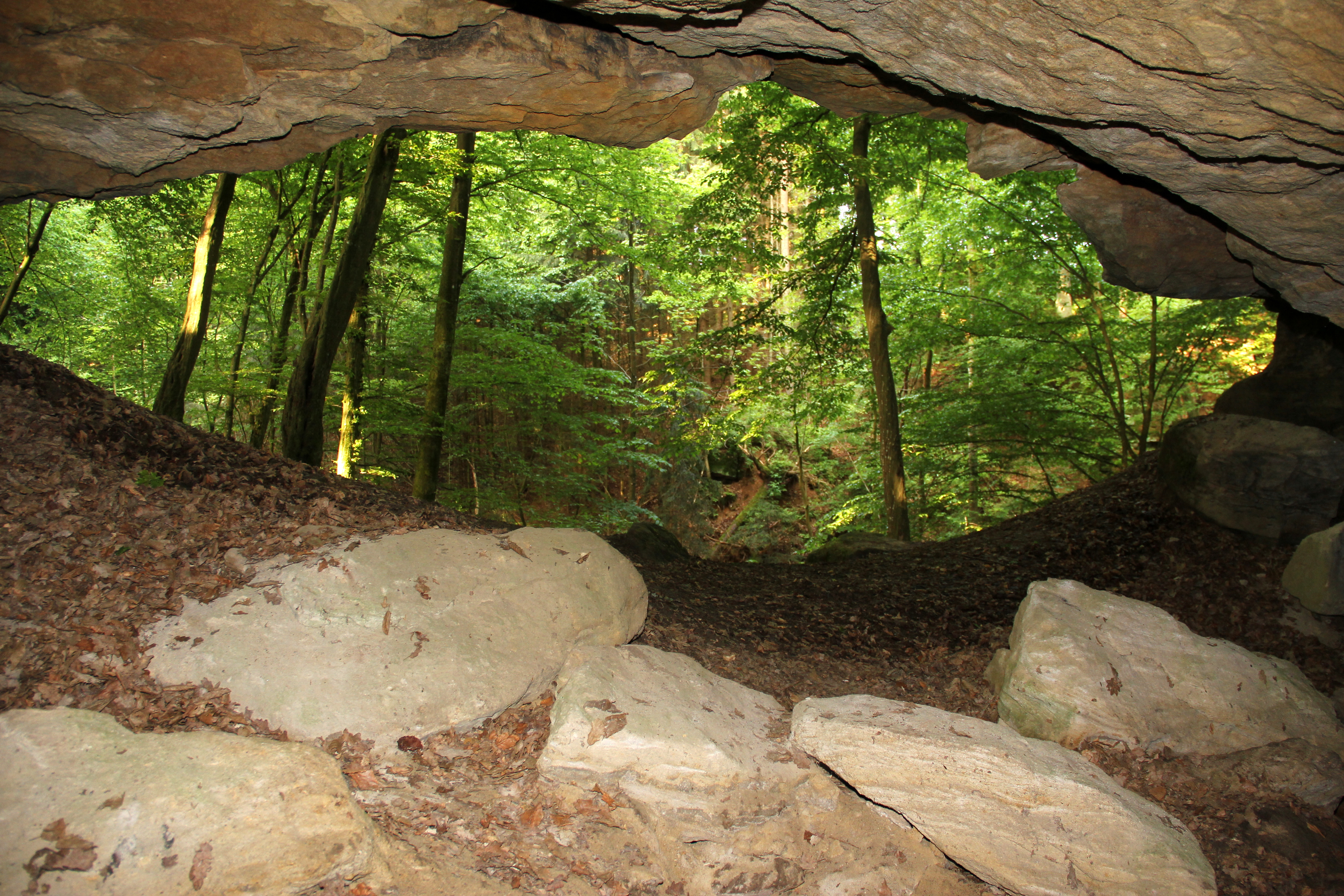 Teufelshöhle bei Altdorf, Eingang von Innen